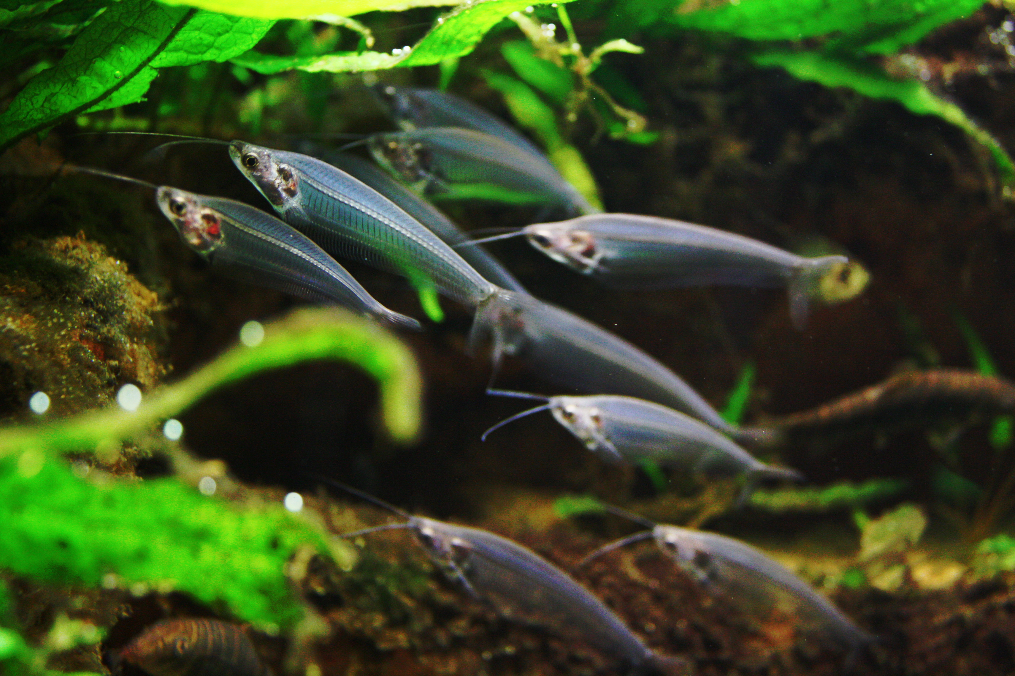 aquarium im frankfurter Zoo